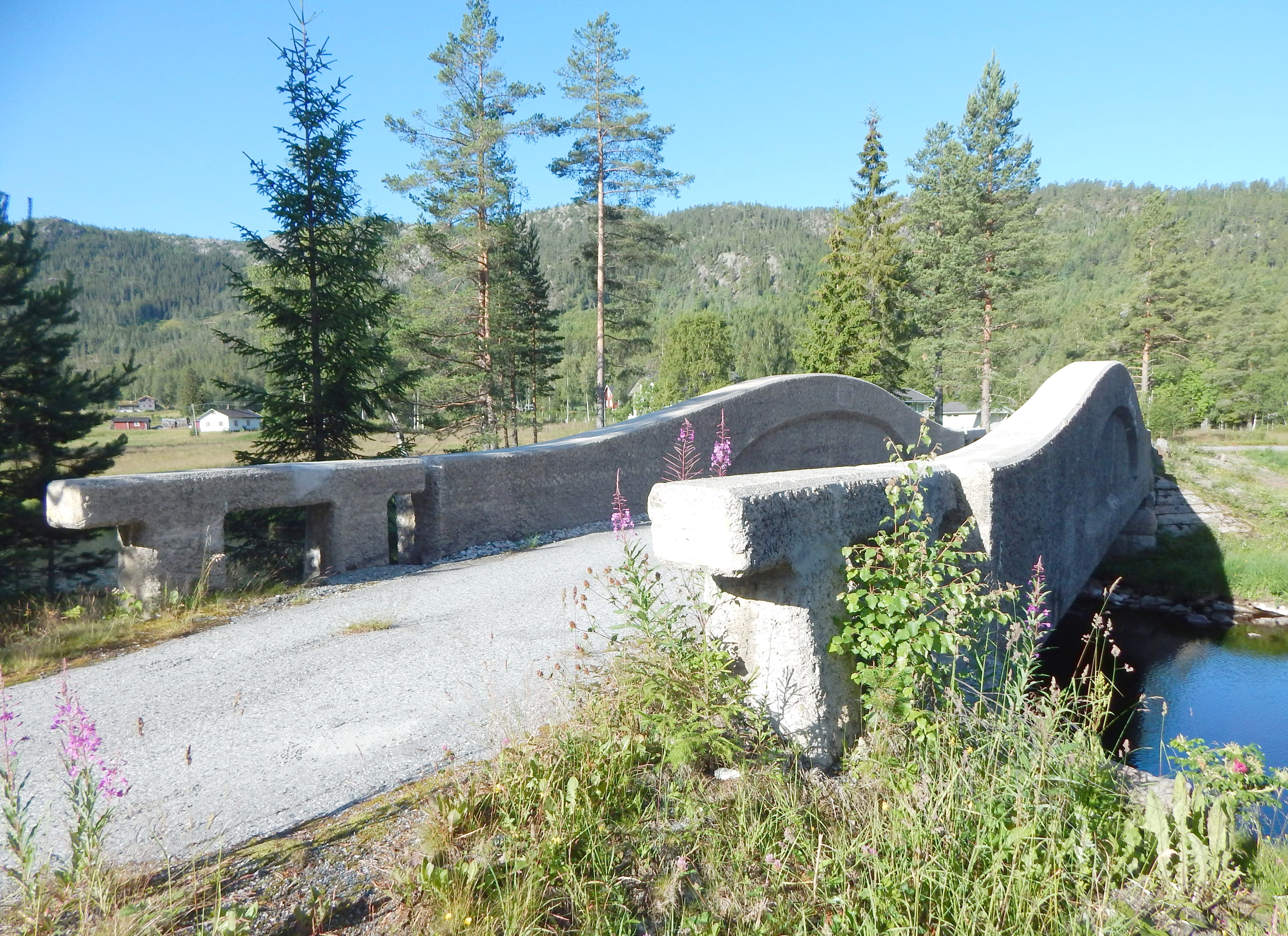 Løka gamle bru